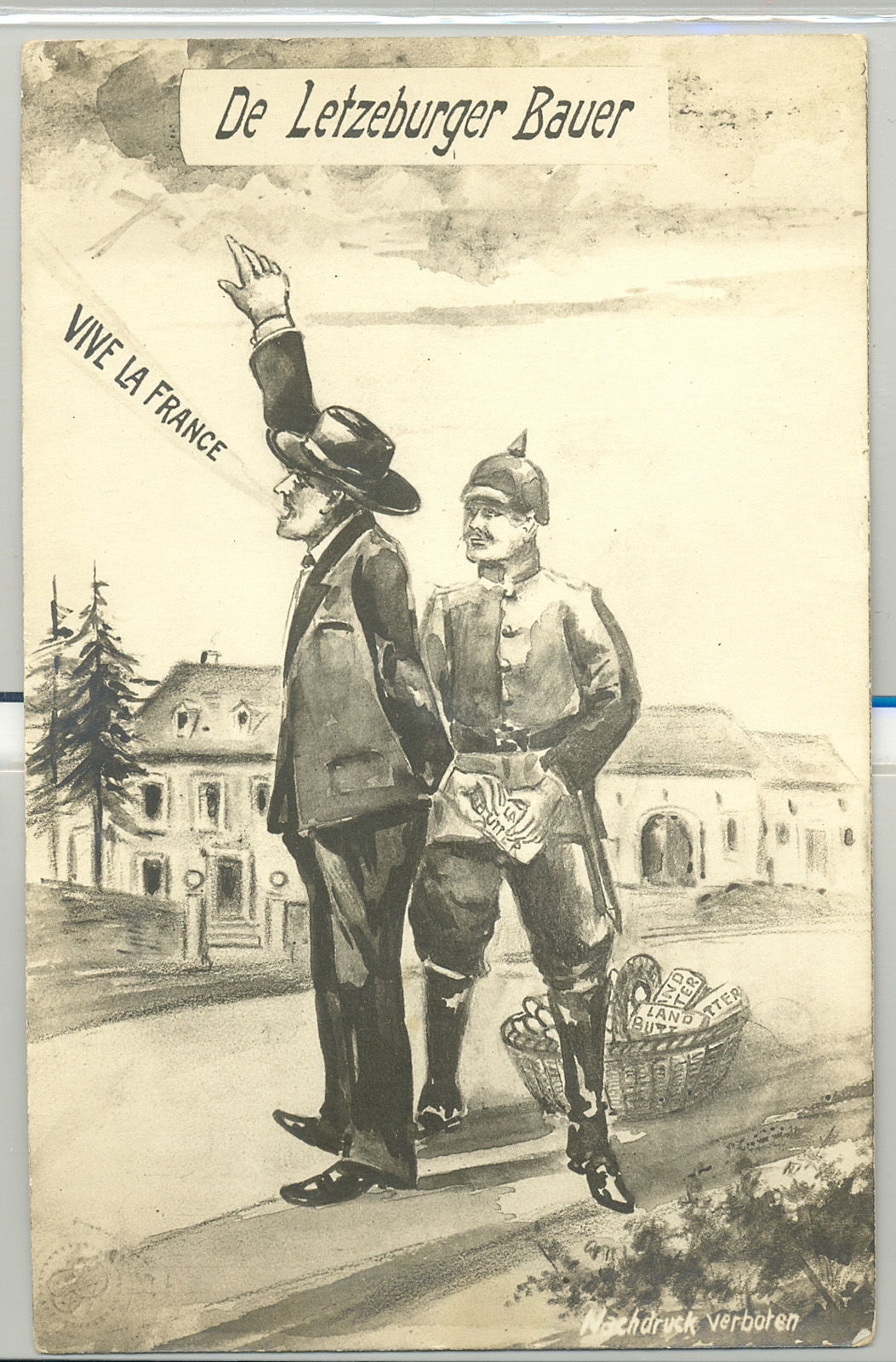 Liewensmëttelkris 1916: satiresch Postkaart géint d'letzebuerger Baueren oder géint den deemolegen Agrarminister Michel Welter.